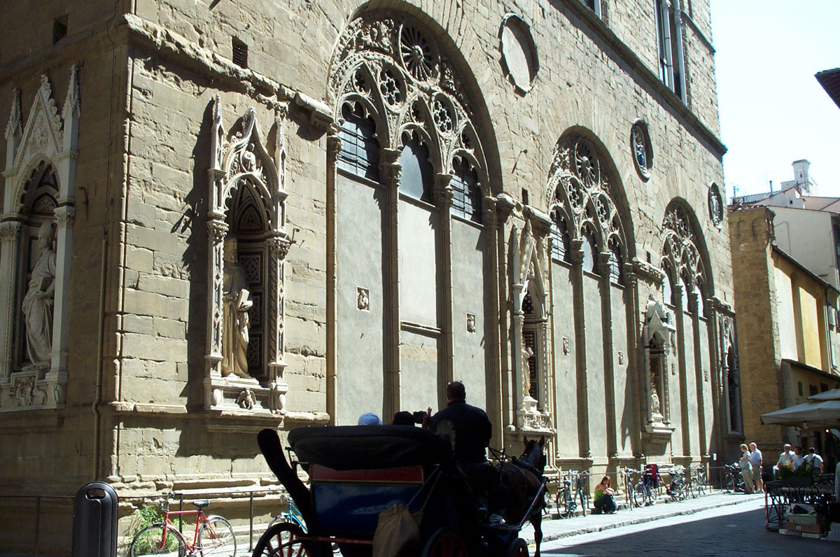 Chapelle Orsanmichele à Florence en Toscane (Italie), Via dei Lamberti.